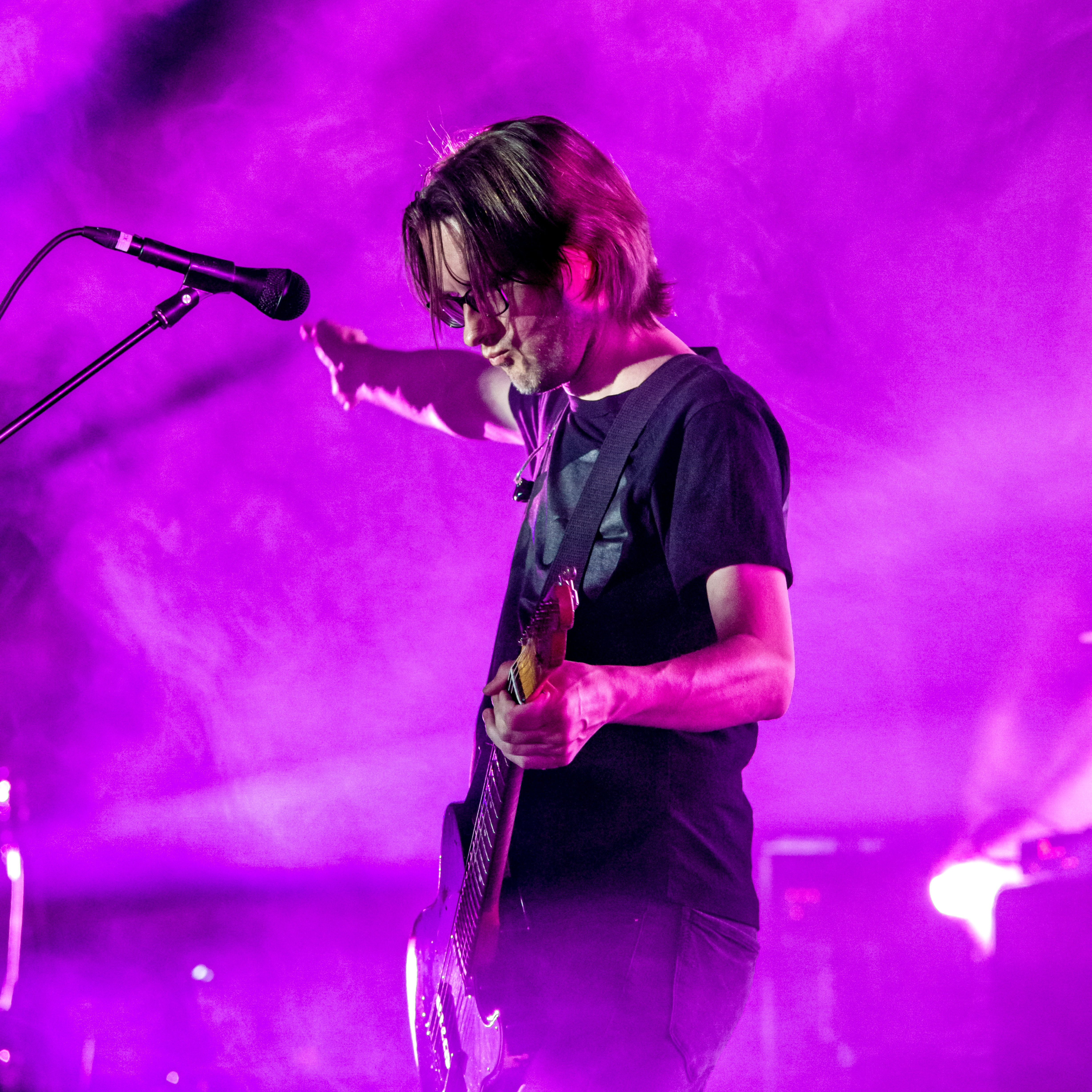 Bilder vom Zelt Musik Festival 2018 in Freiburg im Breisgau Das Eröffnungskonzert mit Steven Wilson